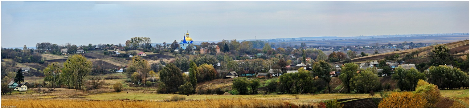 Панорама с. Горыньграда Первого, октябрь 2016 г.